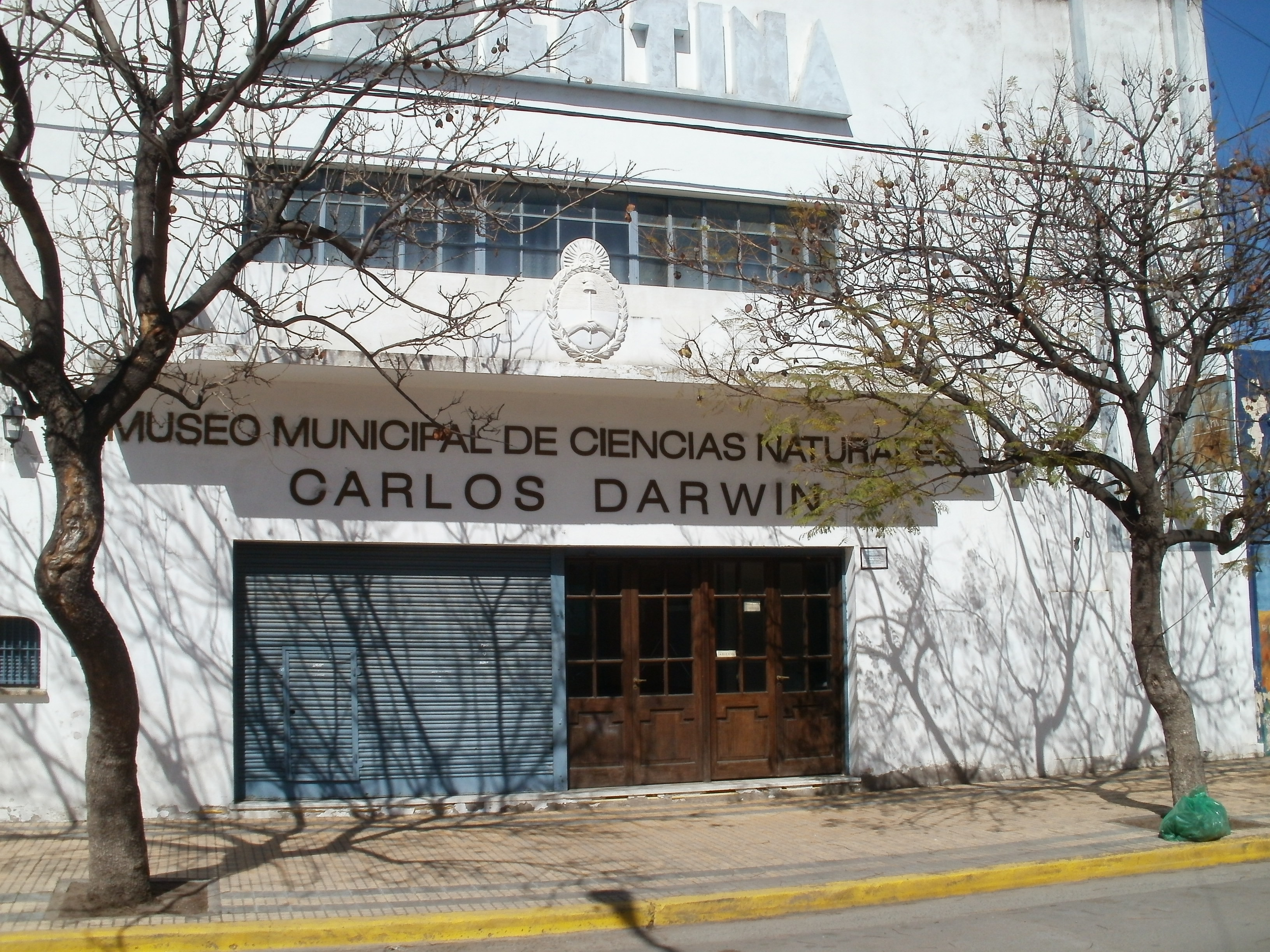 Museo Carlos Darwin, Punta Alta.